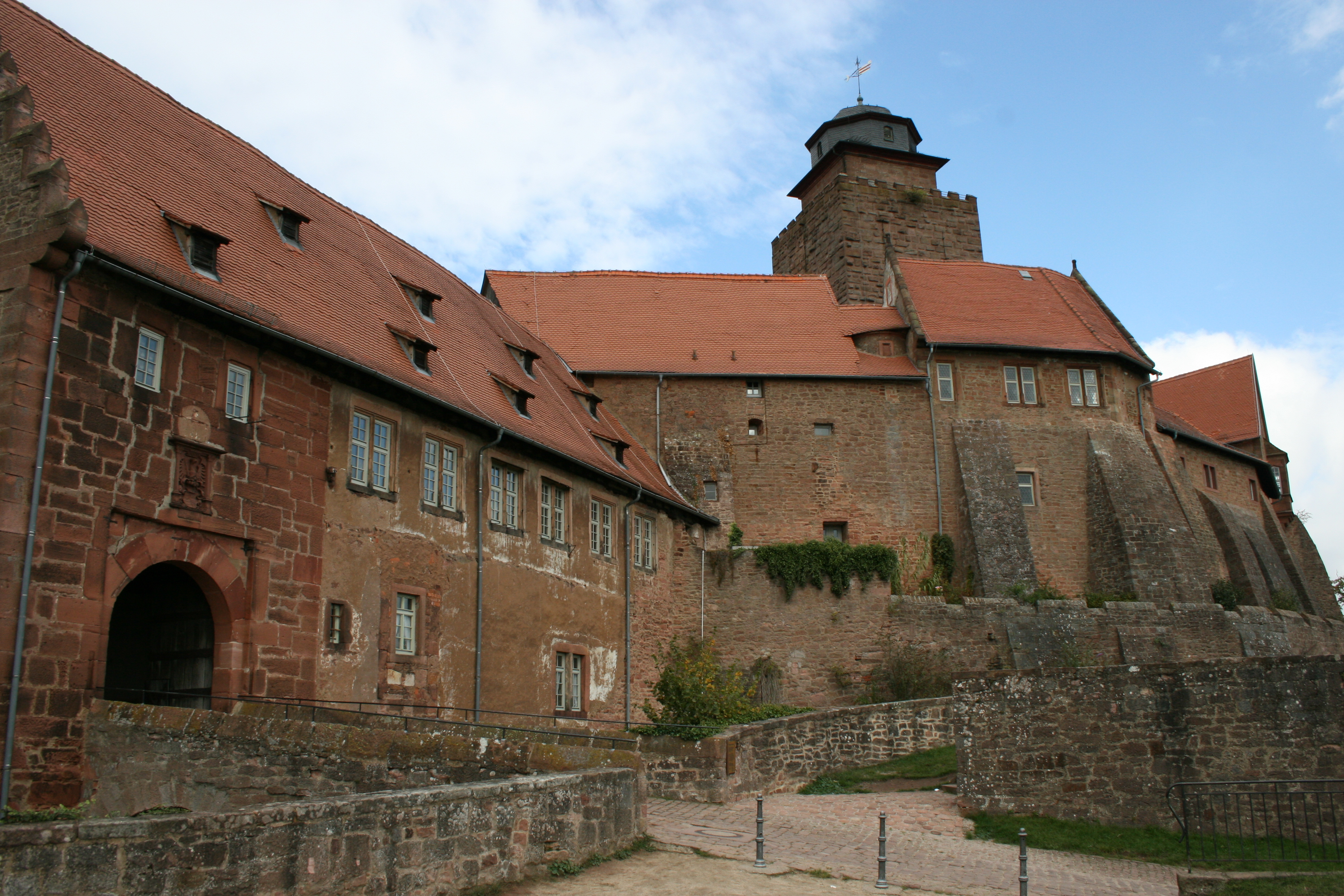 Burg Breuberg im Odenwald, Blick auf den Torbau (links) und die Kernburg 2009.